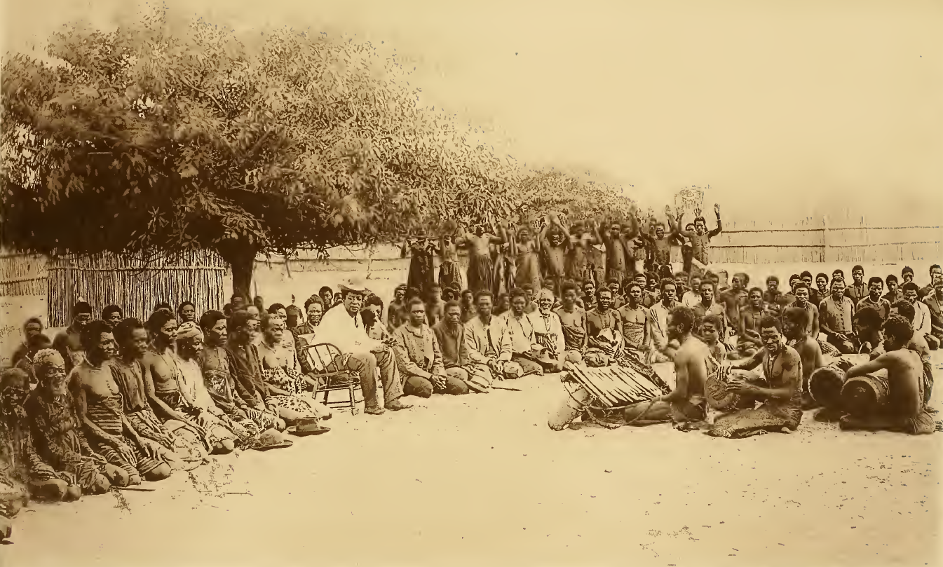 Cour du roi Lewanika, Barotseland, vers 1890